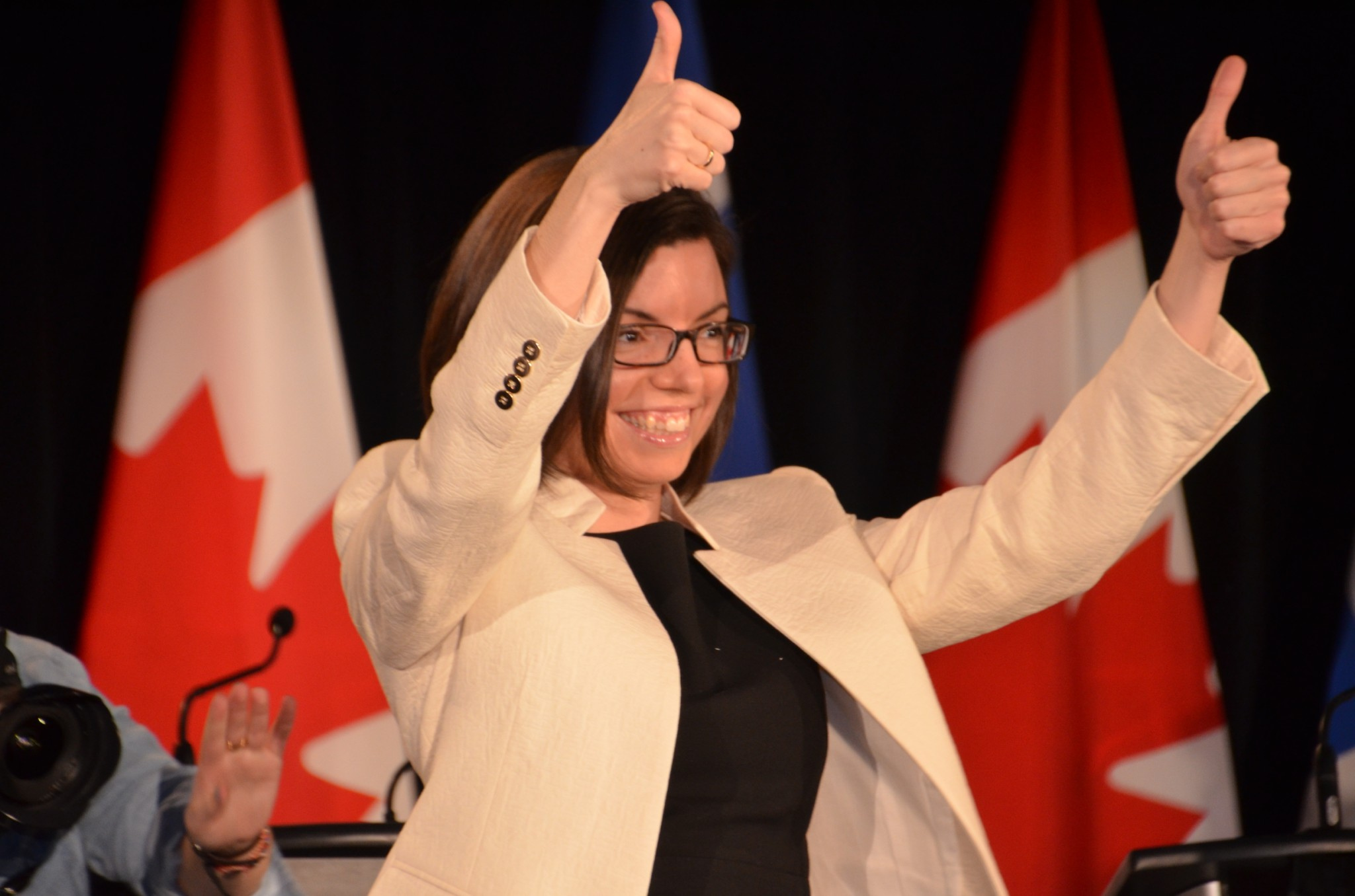 Niki: Two thumbs up!